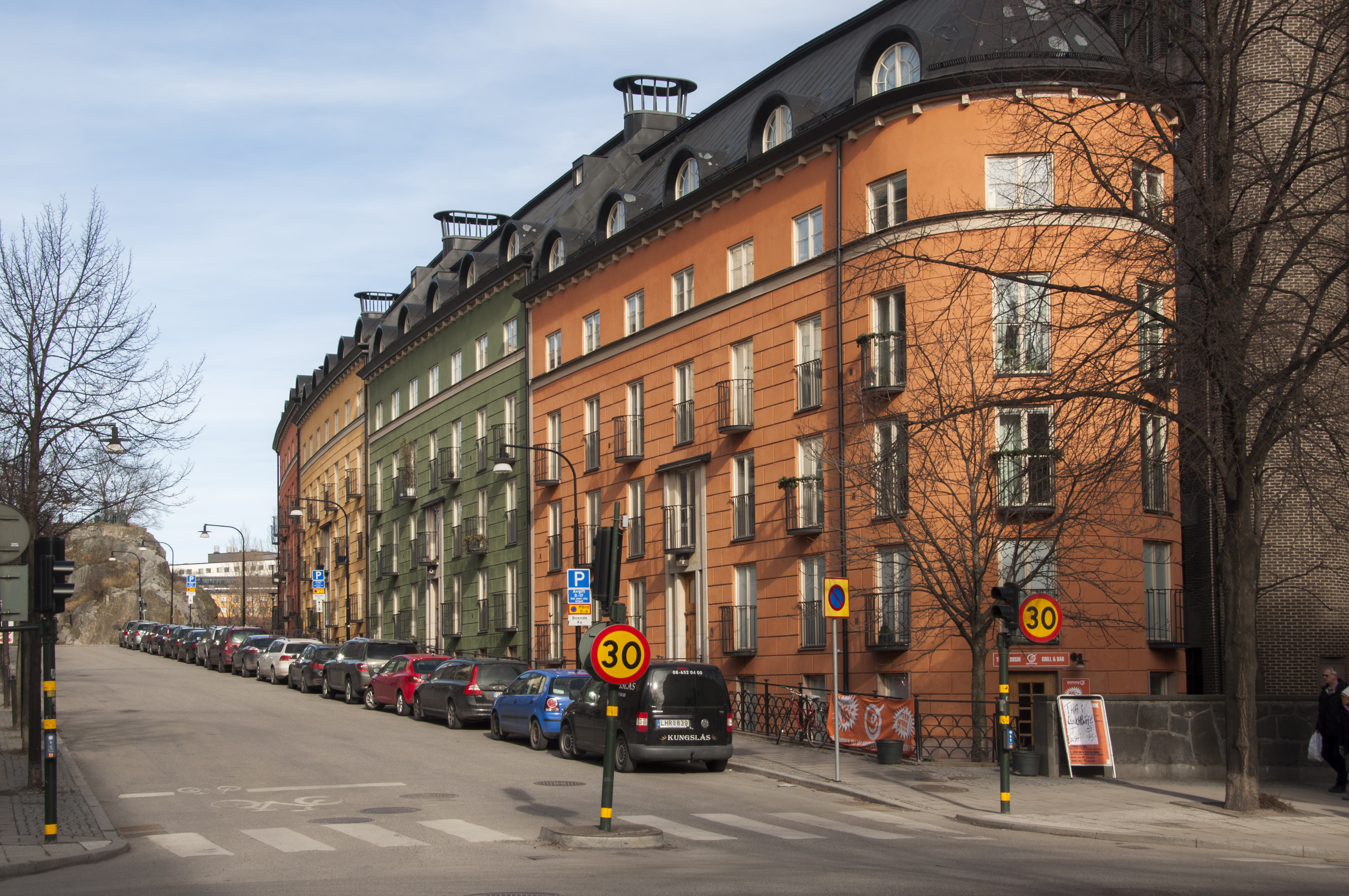 Sankt Eriksområdet utmed Carl Gustaf Lindsteds gata. Byggnadsår 1997-98. Arkitekt: Jan Mizerski, Byggherre: Riksbyggen